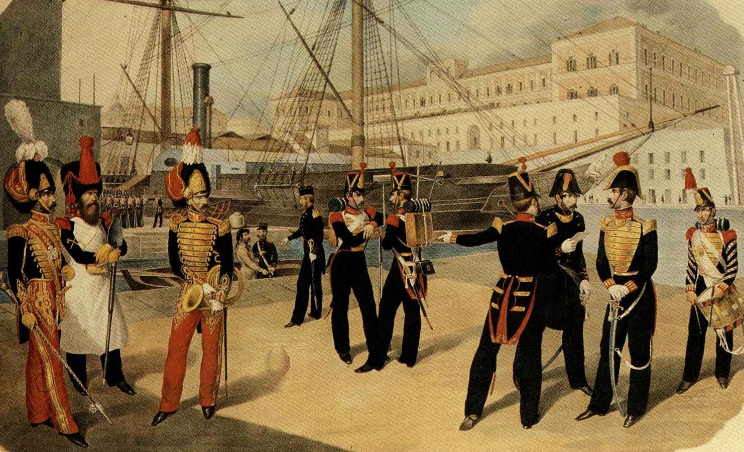 Reggimento "Real Marina", Armata di Mare del Regno delle Due Sicilie